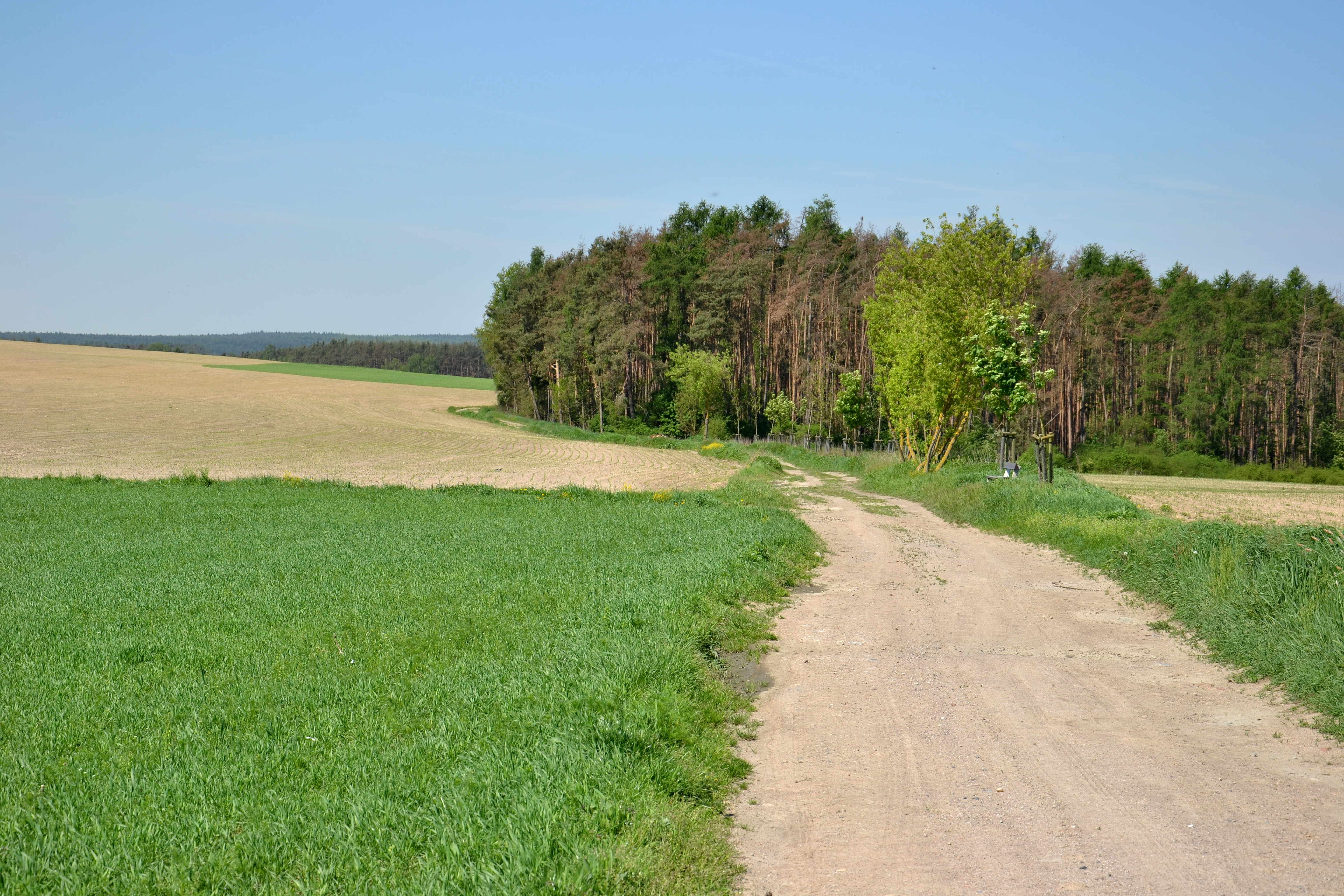 Přírodní park Rohatiny – cesta od Kozojed